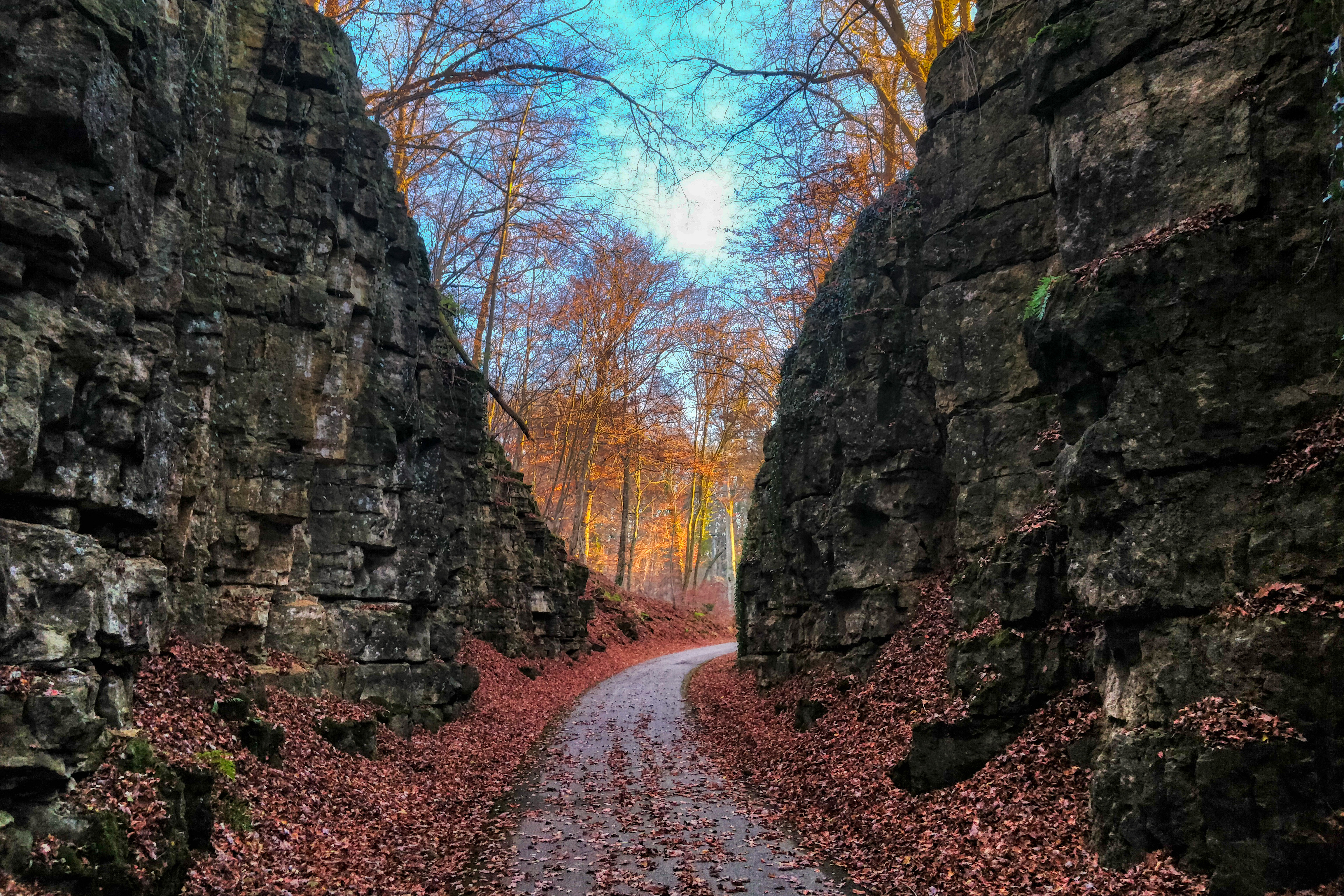 Piste cyclable d'Echternach (PC2)